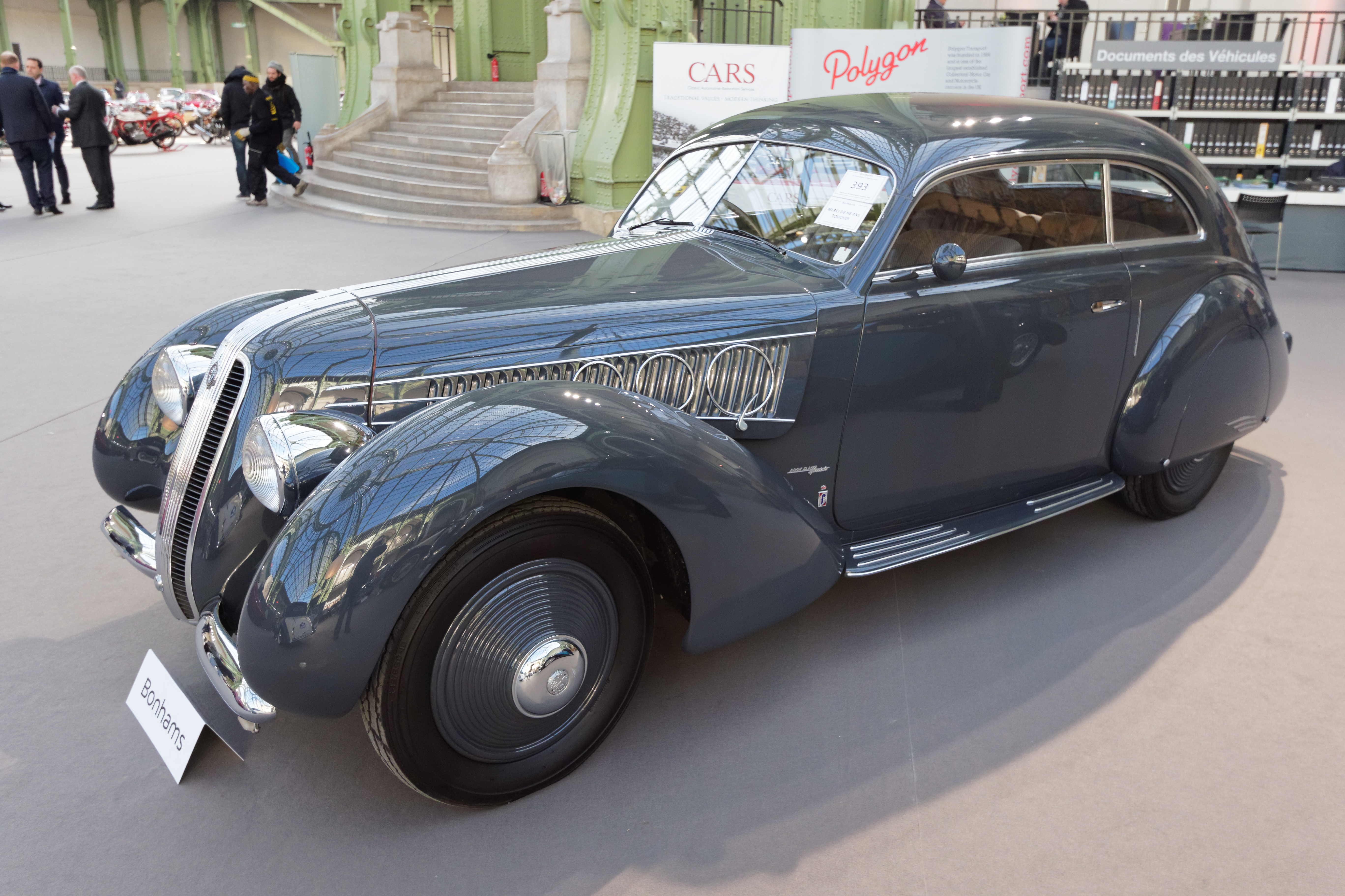 Un des véhicules présenté lors de la vente aux enchères Bonhams 2015 au Grand Palais de Paris.